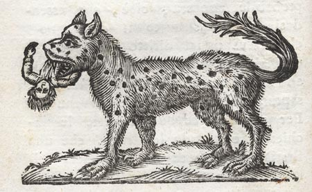 Figura della Bestia feroce tratta da: Giornale circostanziato di quanto ha fatto la bestia feroce nell'Alto Milanese dai primi di Luglio dell'anno 1792 sino al giorno 18 Settembre p. p. In Milano, A spesa dello Stampatore Bolzani, [1792]